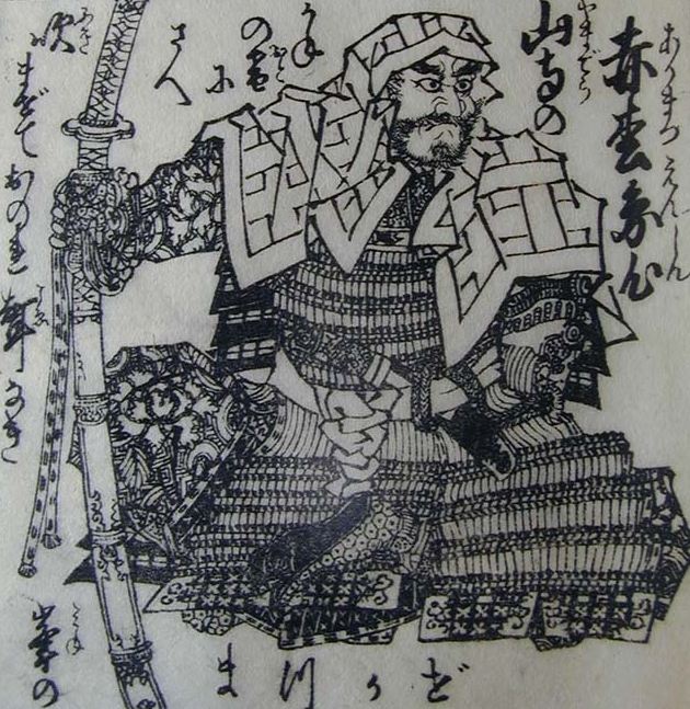 aklamatu_enshin